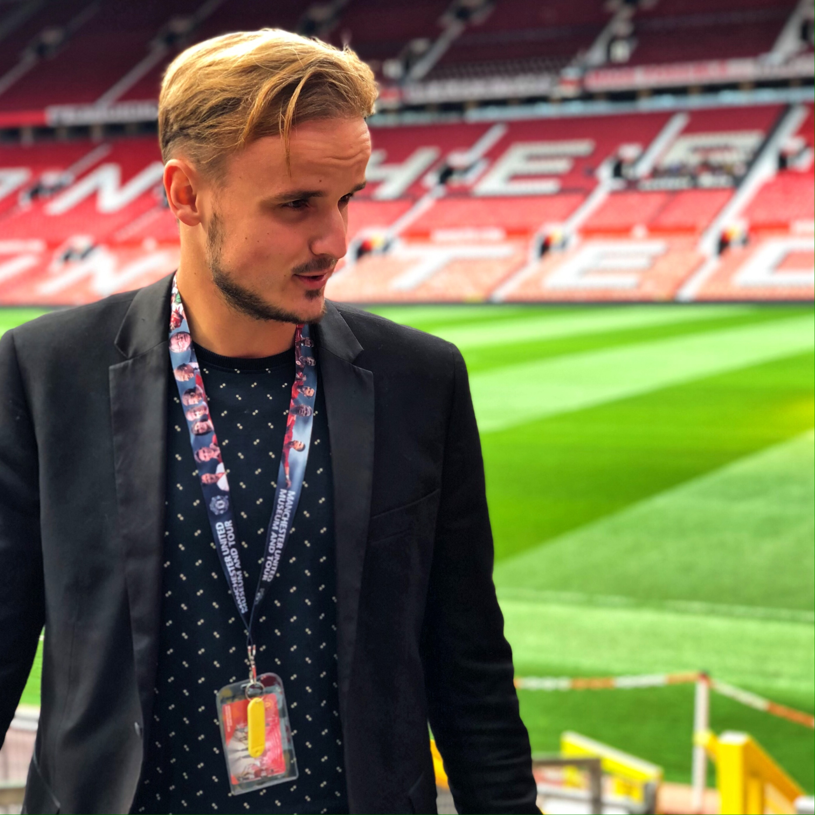 Nick Schubert zu Gast bei Manchester United im Old Trafford